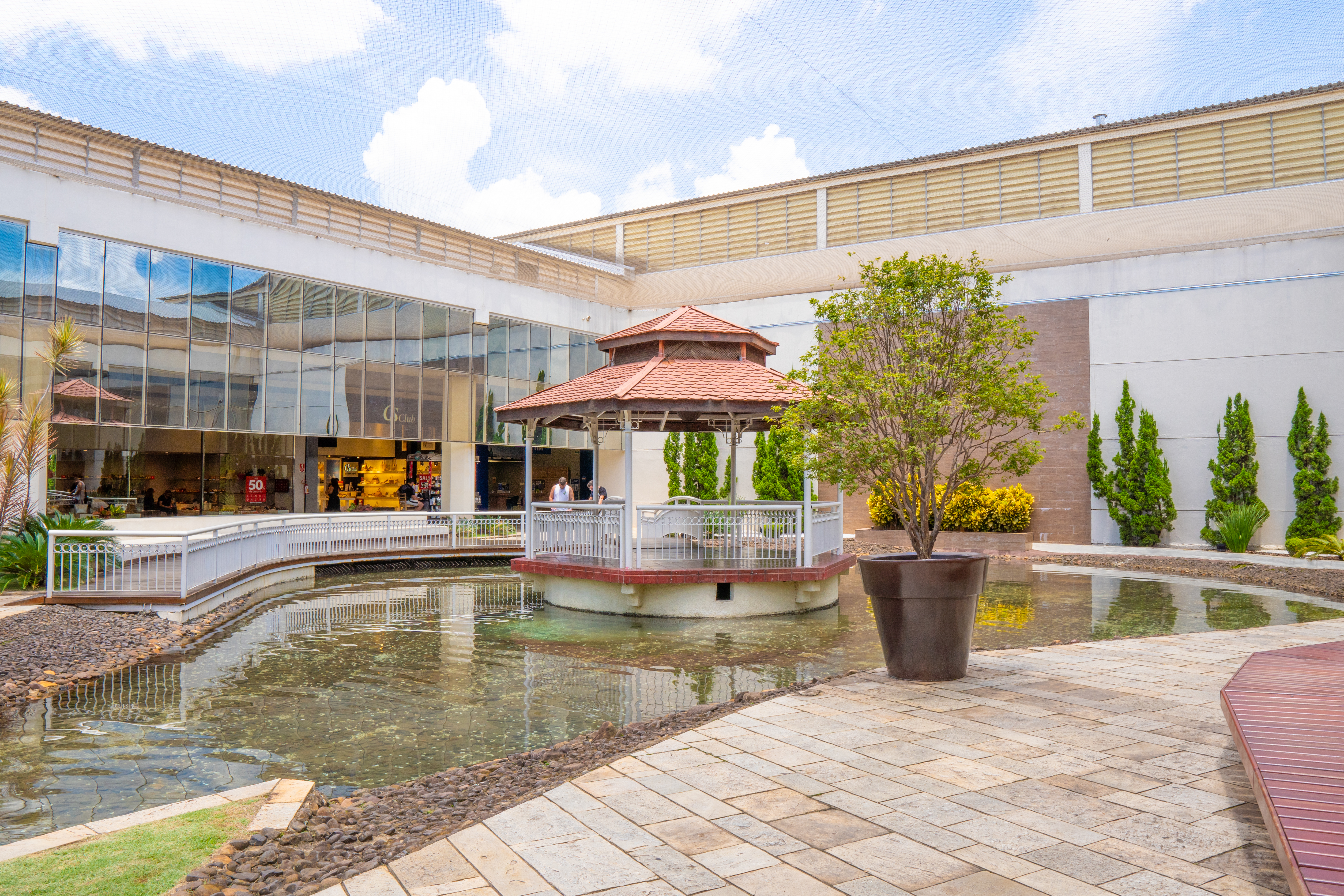 Lago interno do Franca Shopping